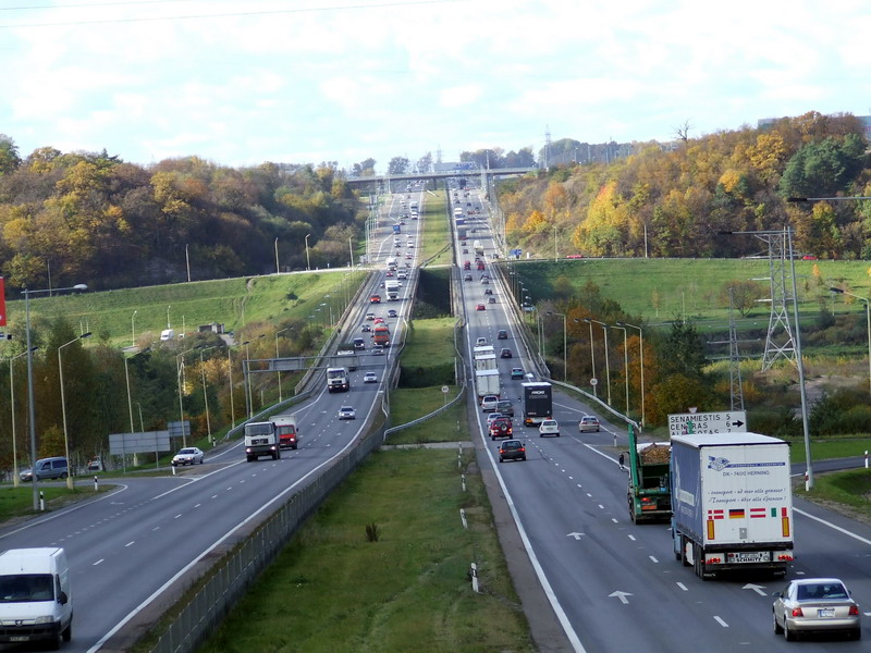 Kleboniškio tiltas, Kaunas.